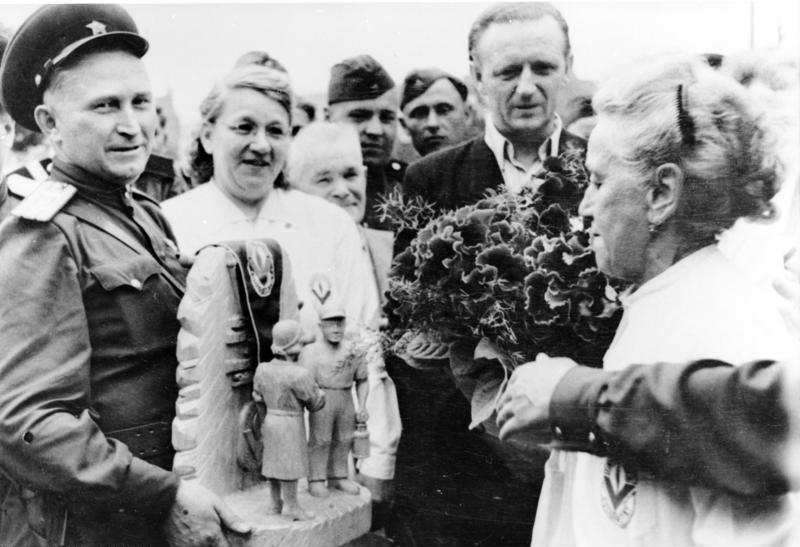 ADN-ZB 1.7.1953 Berliner danken den sowjetischen Soldaten Immer wieder bringt die Berliner Bevölkerung den Angehörigen der Sowjetischen Armee ihren Dank für das überlegte Eingreifen am 17.6.1953, dem Tag der faschistischen Provokation, zum Ausdruck. UBz: Angehörige der Volkssolidarität überreichen sowjetischen Soldaten Geschenke.